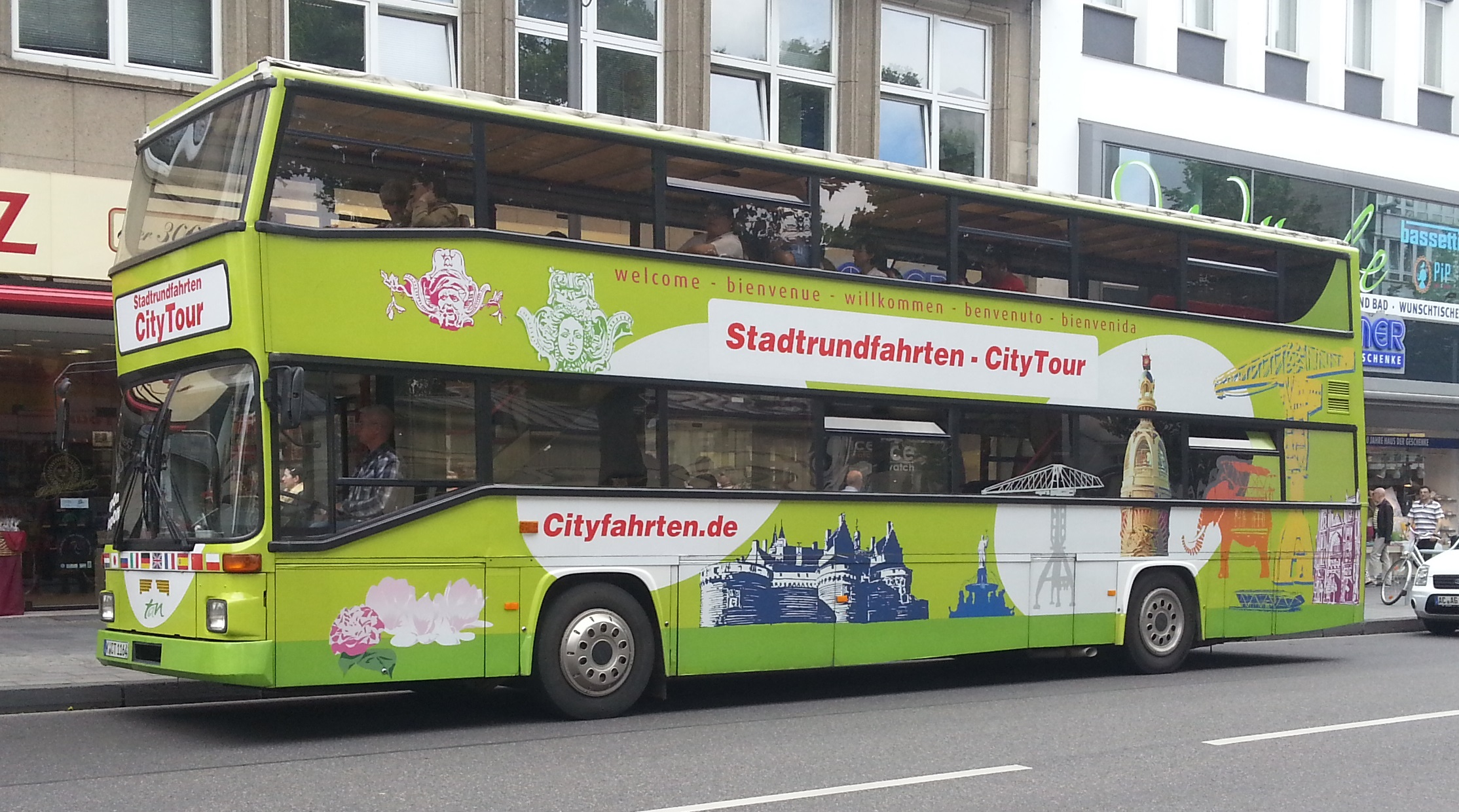 Ehemaliger MAN SD 202 Doppeldeckerbus der Berliner Verkehrsbetriebe (BVG) nach seinem Umbau zum Cabriobus (hier mit geschlossenem Verdeck) auf Stadtrundfahrt in Aachen an der Haltestelle Elisenbrunnen, gegenüber der Tourist Information Aachen